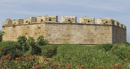 photo du bordj de tamentfoust